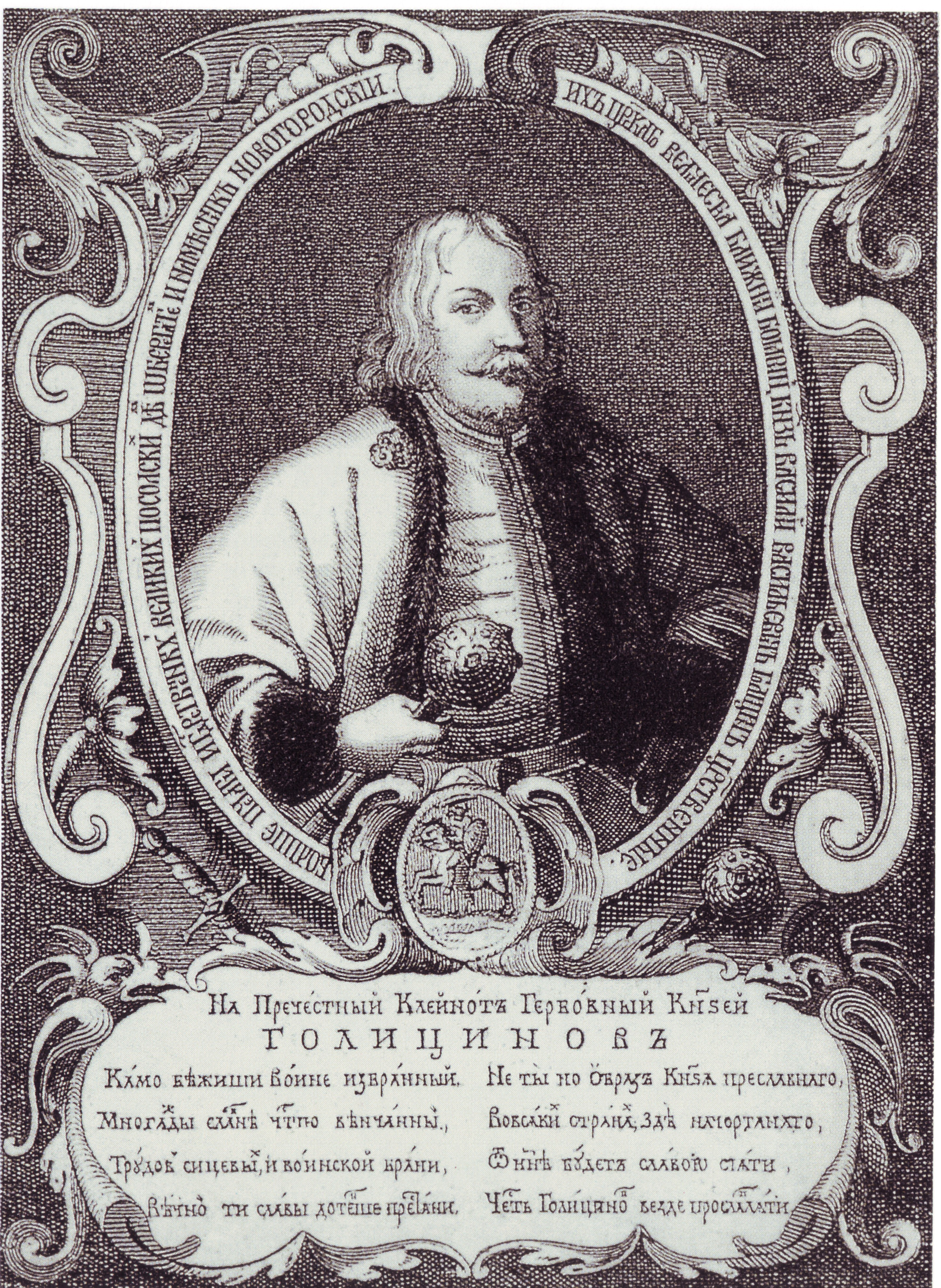 Wassili Wassiljewitsch Golizyn Portrait de Vassili Golitsyne - Gravure ancienne